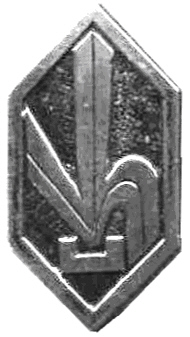 Własna praca Kwz